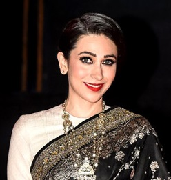 Karisma Kapoor at TOIFA 2016